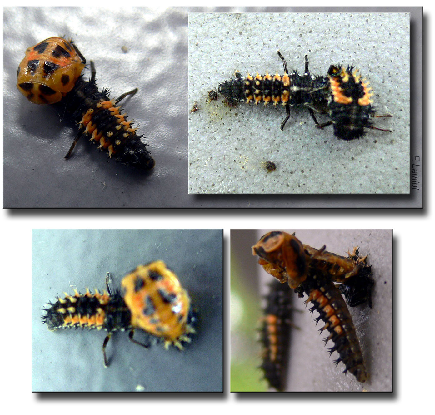 Comportement de canibalisme chez la coccinelle asiatique (invasive).